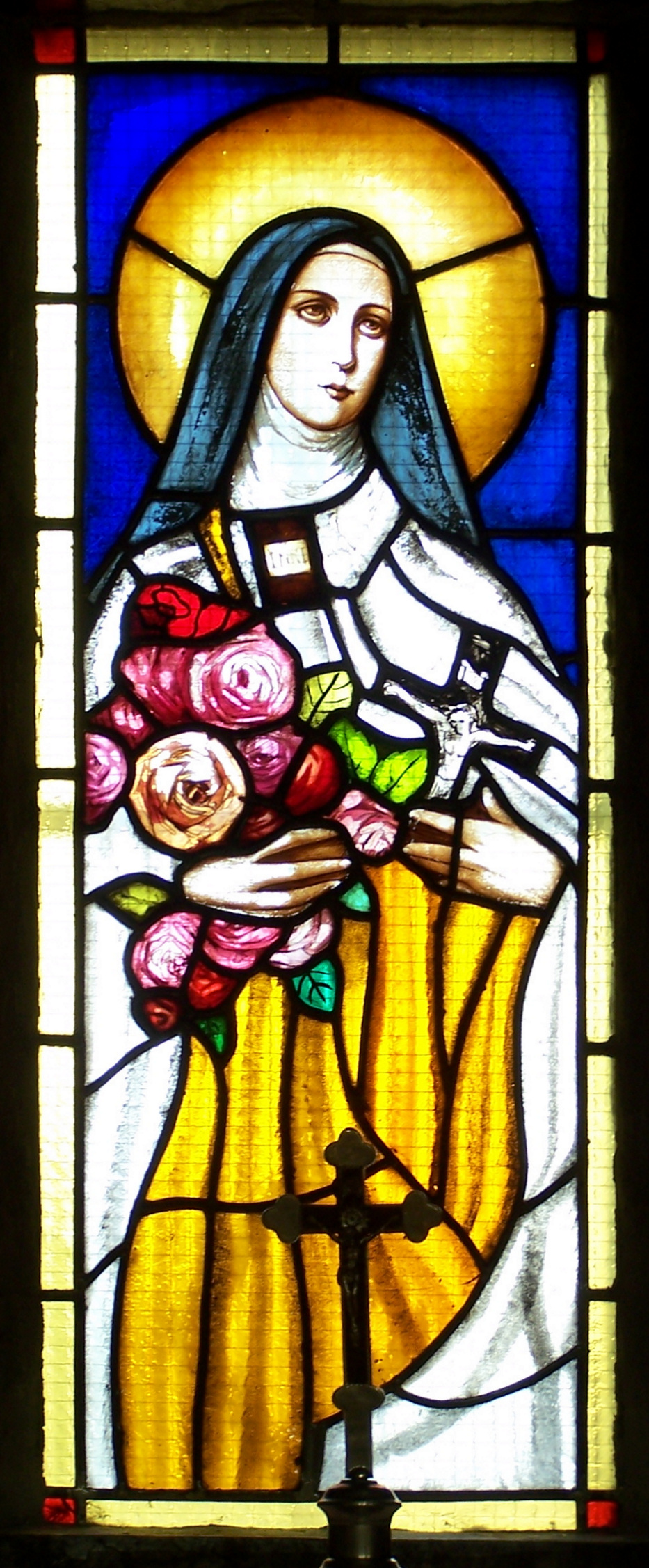 Witraż przedstawiający św. Tereskę znajdujący się w lewej nawie bocznej kościoła garnizonowego pw. św. Kazimierza w Katowicach.